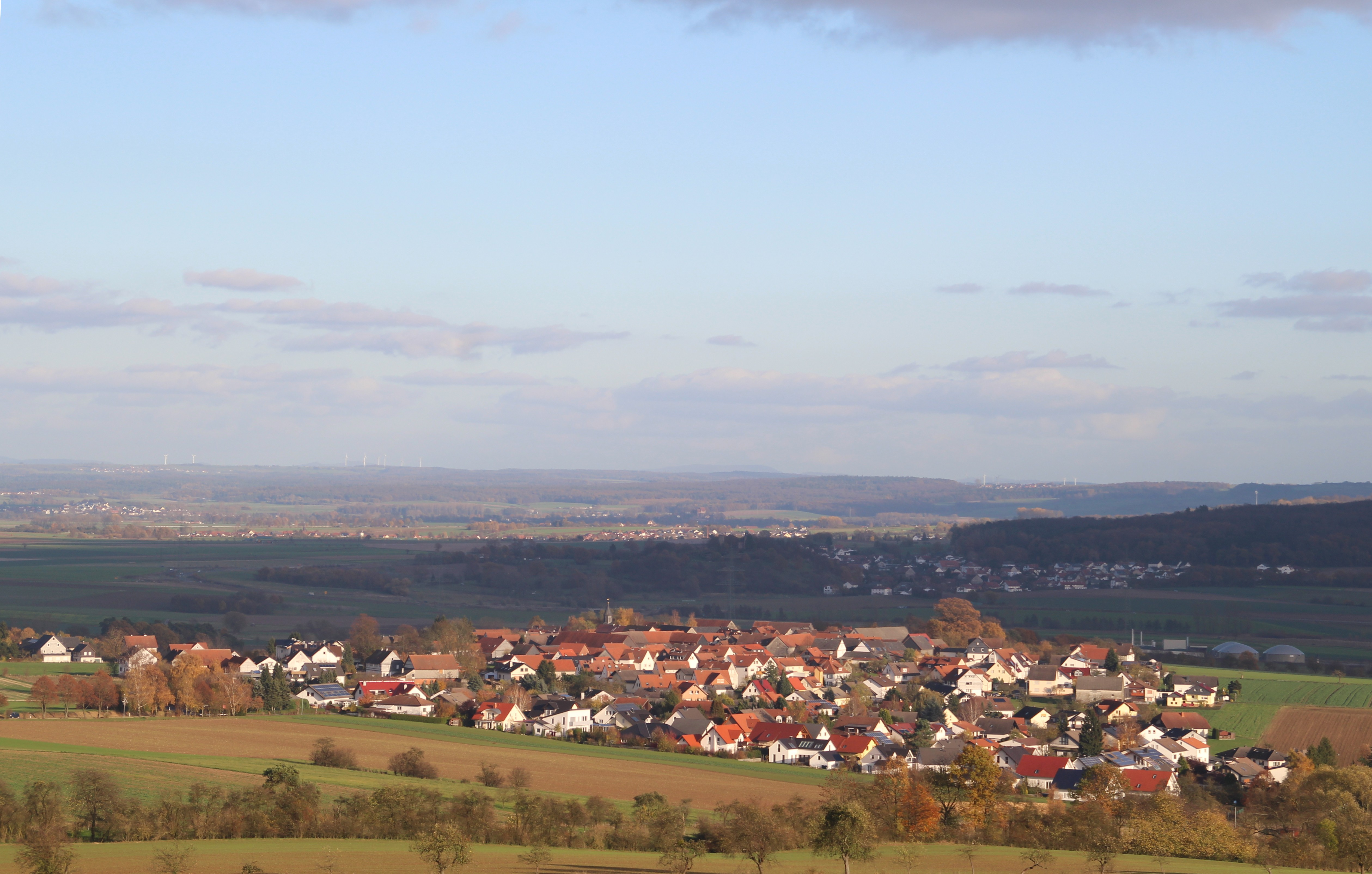 Beltershausen vom Fuß des Frauenberg. Links das Amöneburger Becken